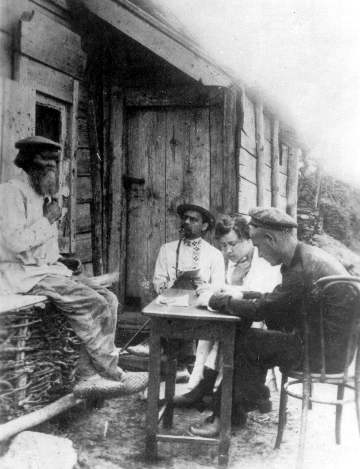 Фольклорная экспедиция 1920-х годов. На фото сидит на крыльце проф. Б. М. Соколов, за столом Т. М. Акимова и студент-практикант, на завалинке сказочник-балагур Б. Г. Парфенов